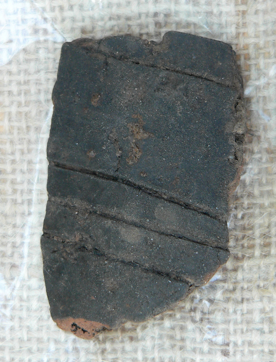 Keramikfragment als Fundstück der Siedlung Rosdorf Mühlengrund mit Verzierung aus namensgebenden Bändern der bandkeramischen Kultur